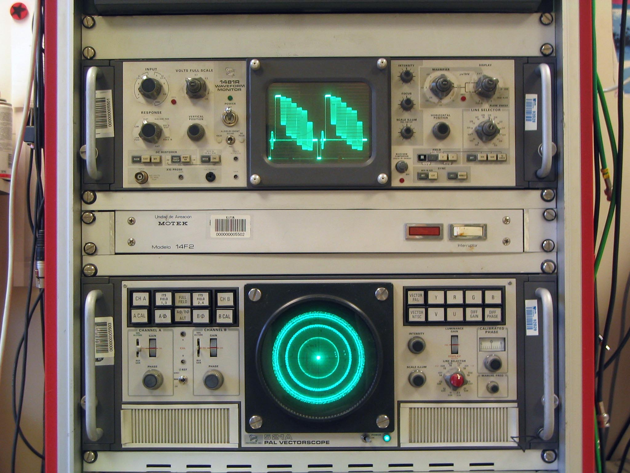 MFO y vectoscopio.